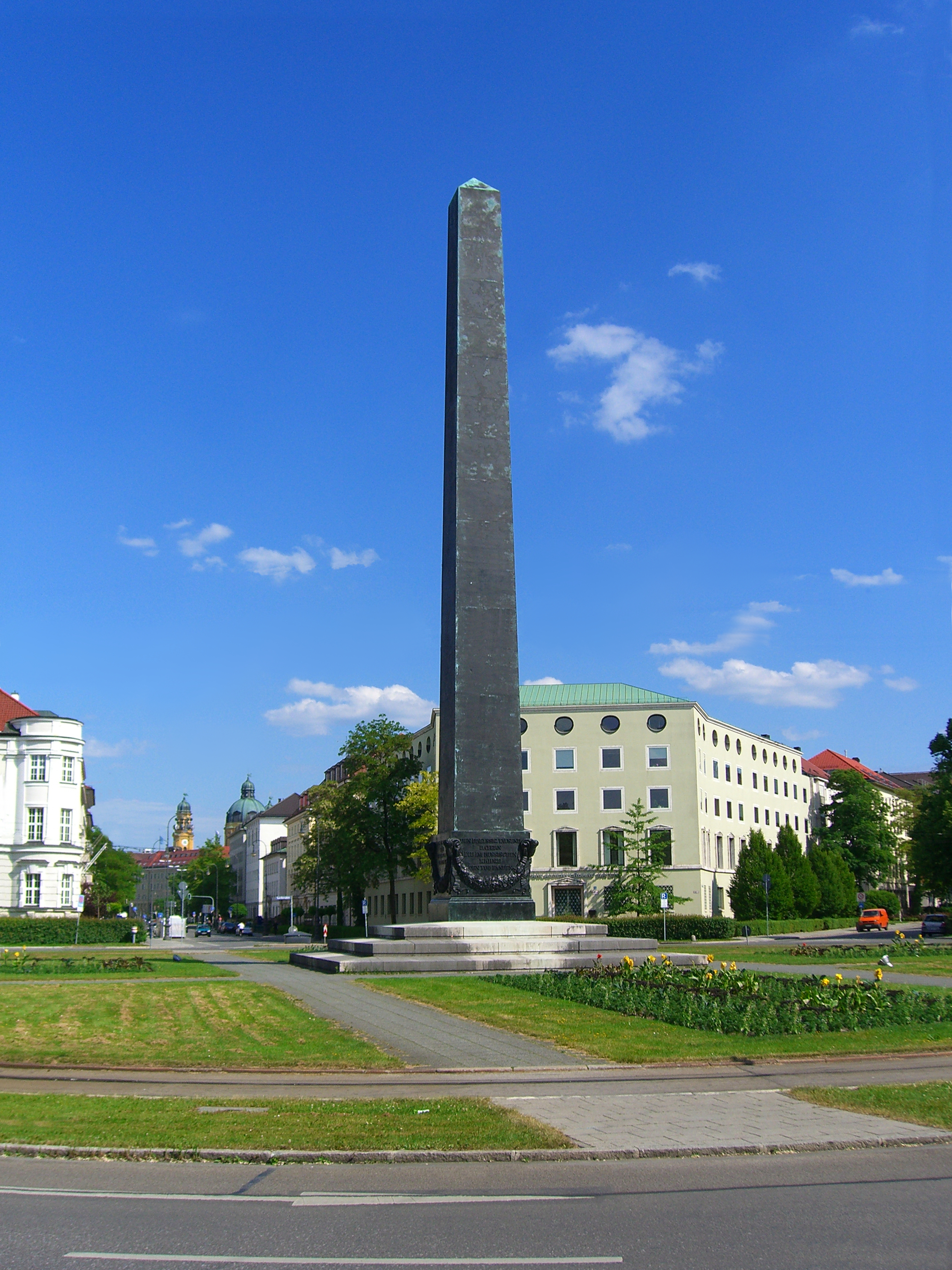 Obelisk am Karolinenplaz Muenchen